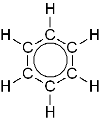 Benzene Grenzstruktur 1